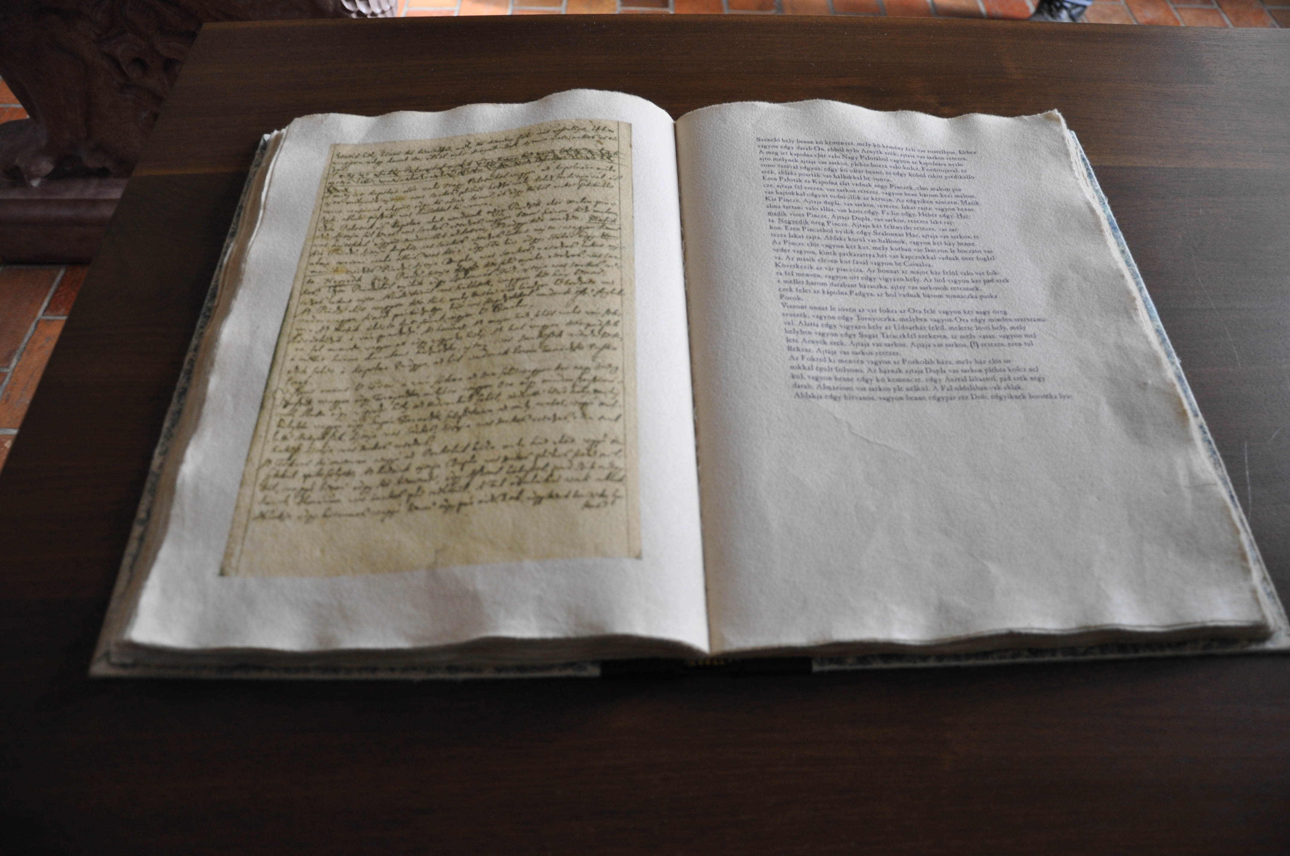 Az újjáépült Füzér vára; inventárium